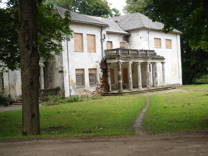 Mezmuiža manor house near Limbazi